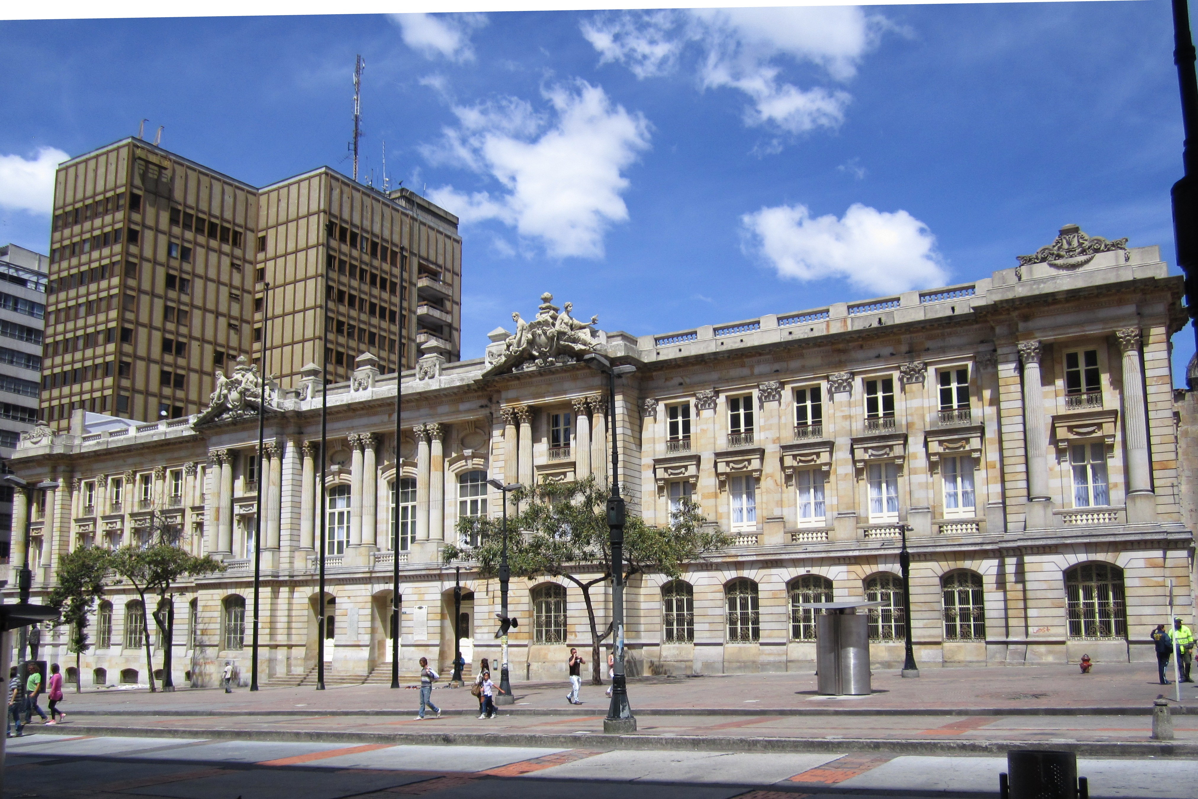 Palacio de San Francisco Antigua Gonernación de cundinamarca, en bogotá.